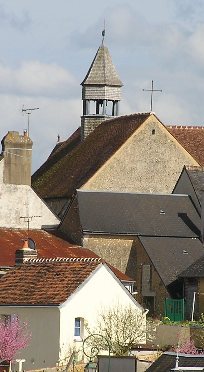 Vue partielle de la chapelle-huon, avec le campanile de l'église